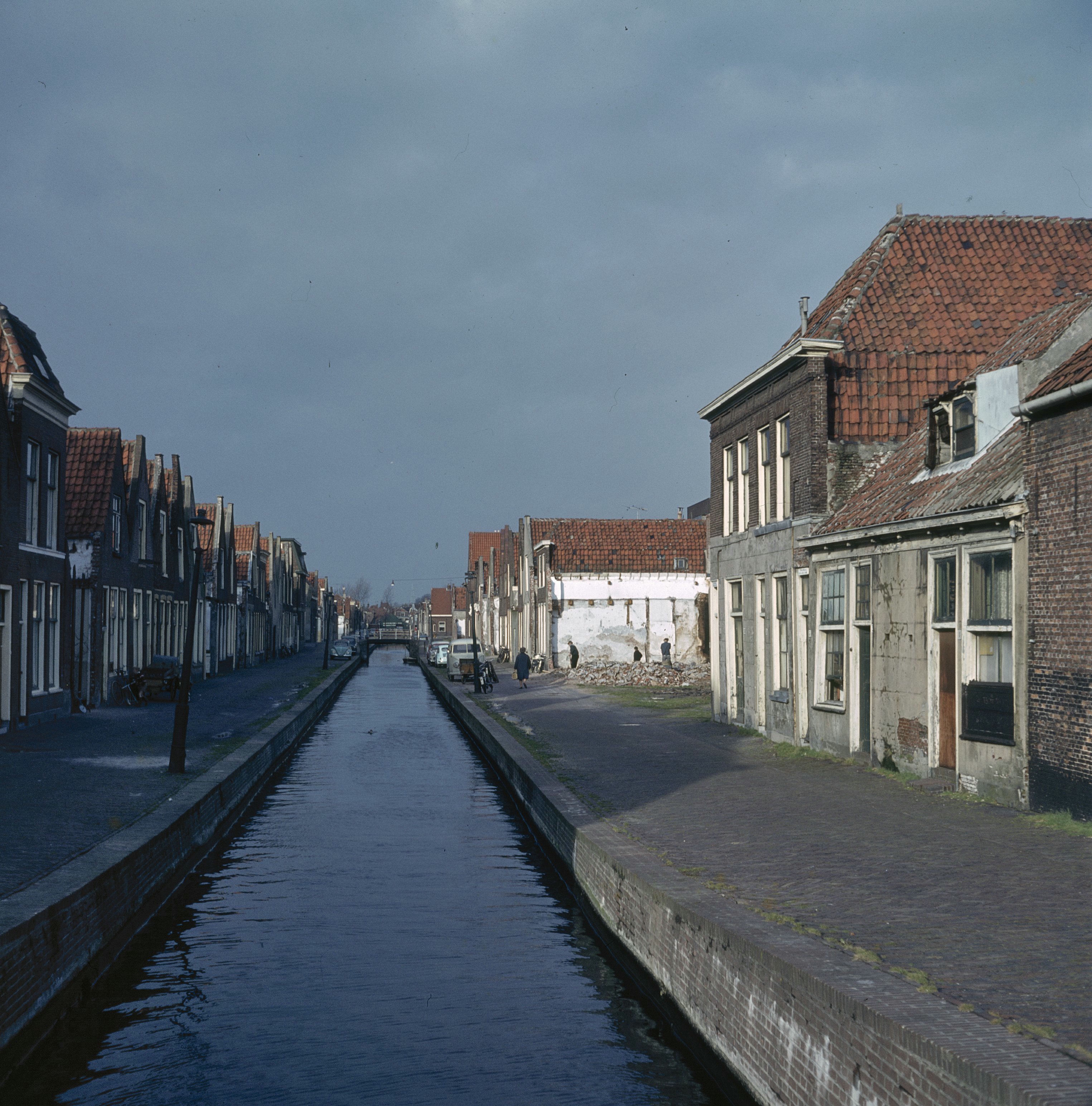 Sloop: Overzicht met gesloopte huizen